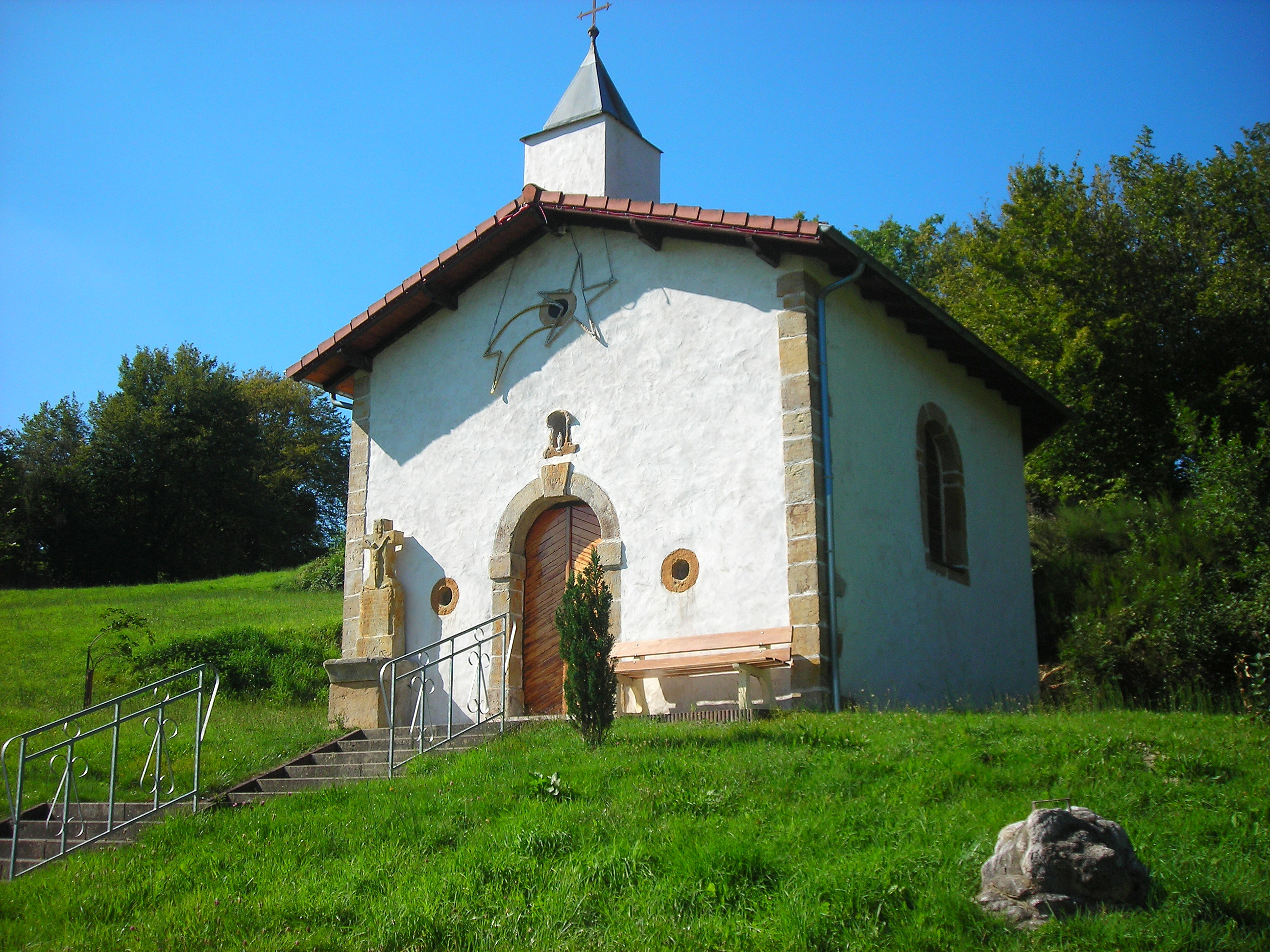 Chapelle Notre-Dame-de-Bon-Secours de Bisten-en-Lorraine (Moselle, France)